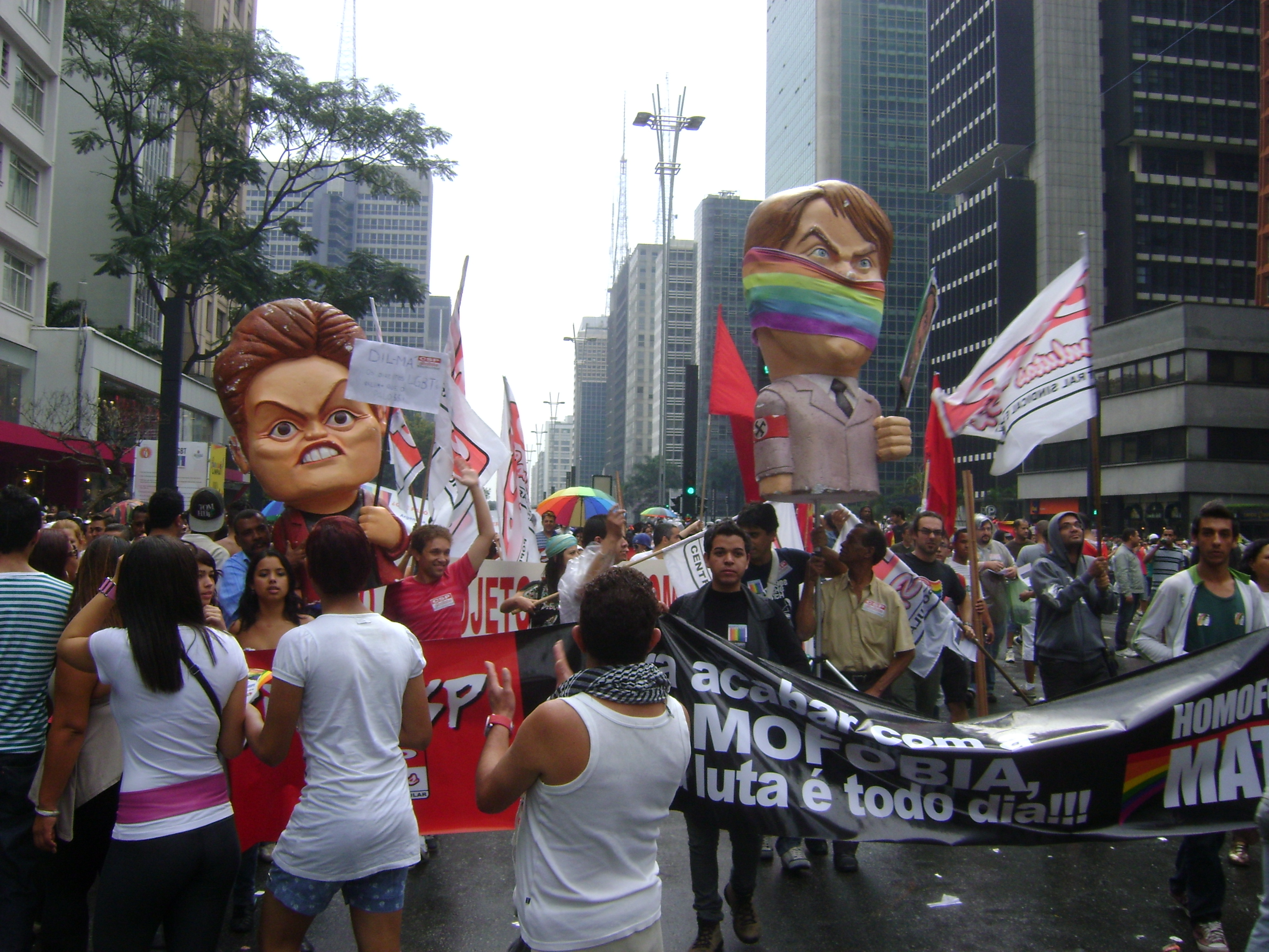 Parada Gay de São Paulo 2011 - bonecos da presidente Dilma Rousseff e do deputado federal homofóbico Jair Bolsonaro.